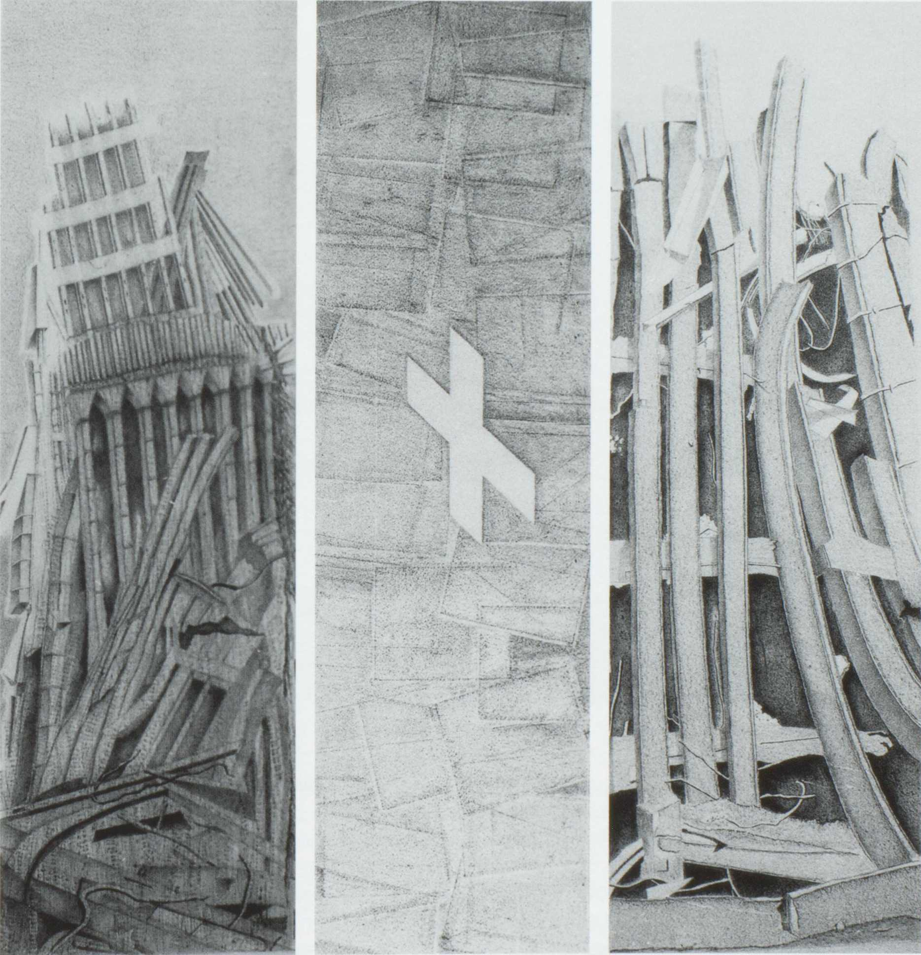 World Terror Center 11. September 2001 von Ursula Stock, Zeichnung, 3-teilig, je 200 x 60 cm, 2002.